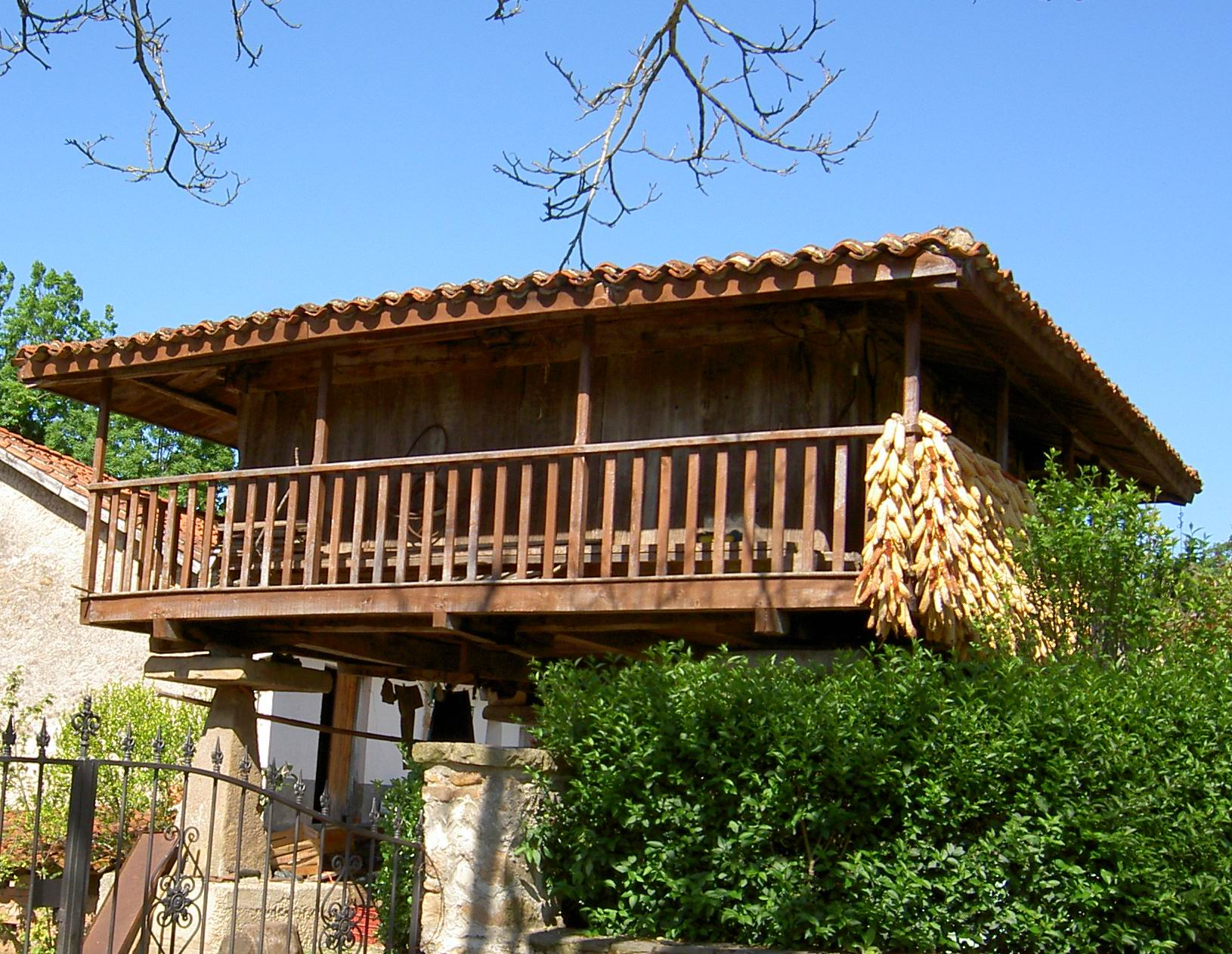 Hórreo cerca de Deva, Gijón, Asturias mayo 2005